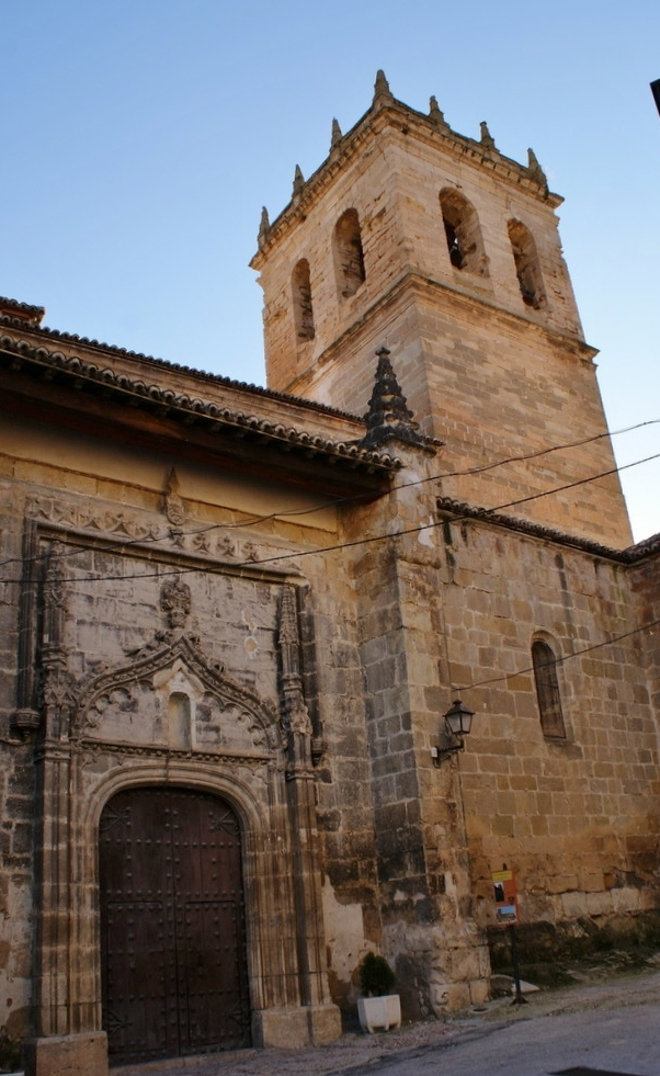 Iglesia Parroquial de San Juan Bautista, Auñón, Guadalajara: estilo plateresco, claro ejemplo del gótico tardío.